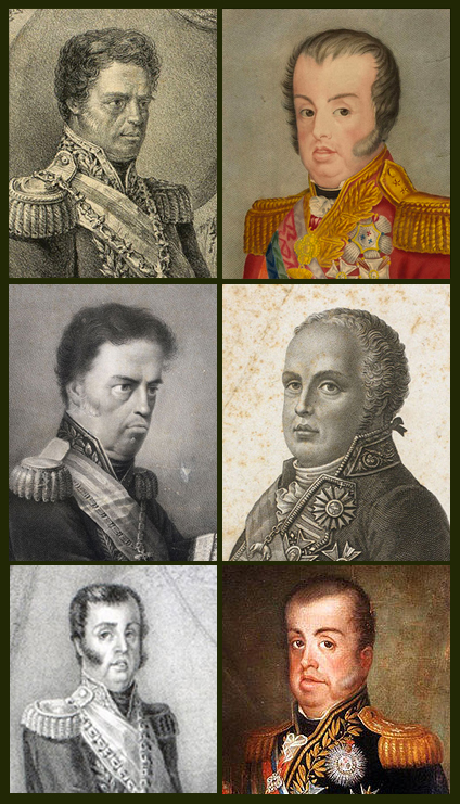 Vários retratos de dom joão vi